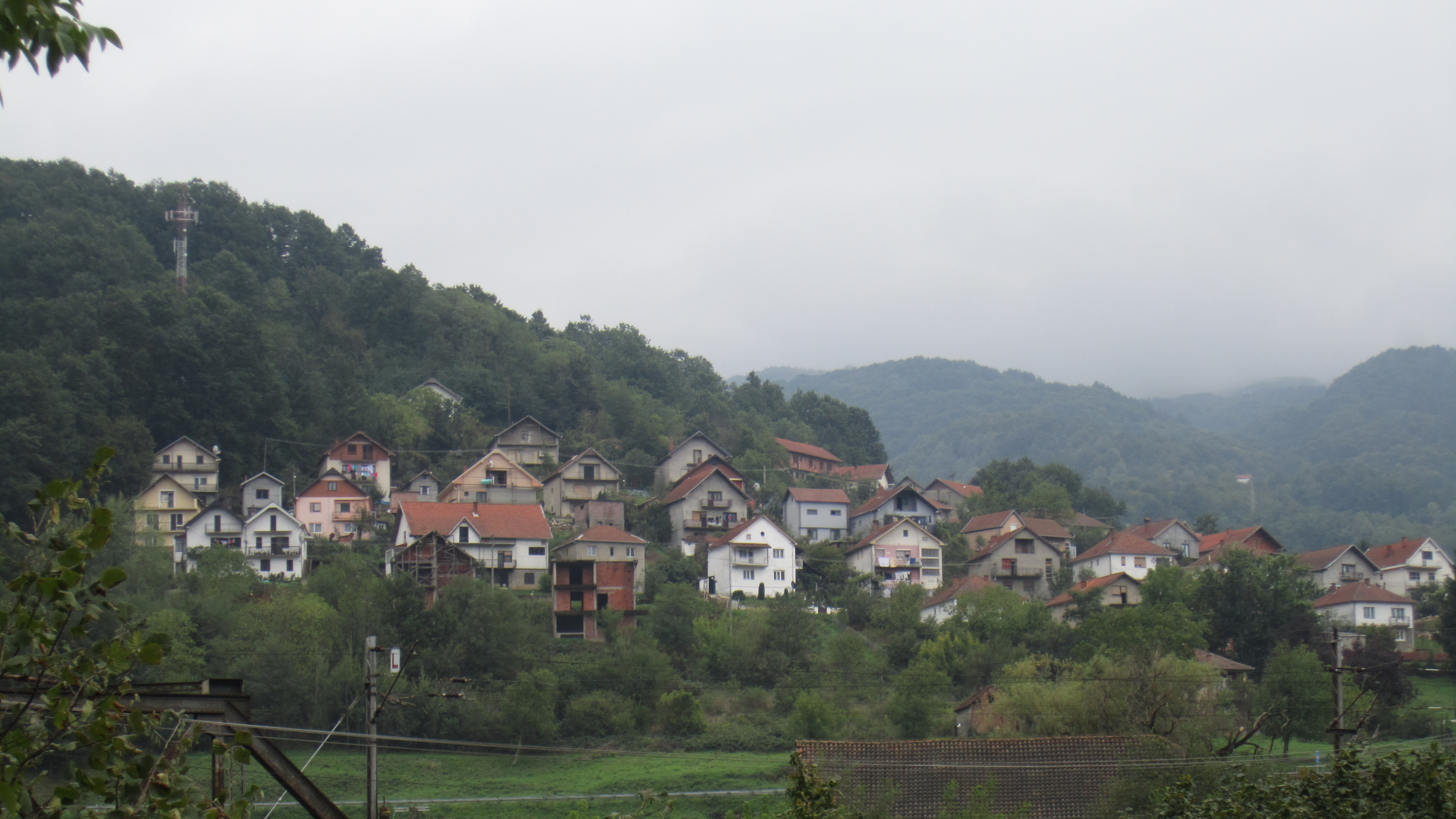 Srpski (latinica): Predejane, Leskovac